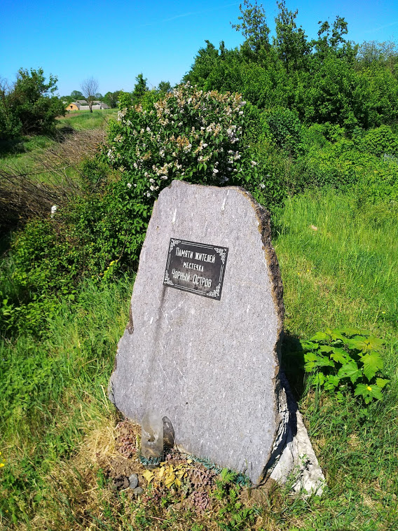 מצבה בבית קברות יהודי בצ'ורני אוסטרוב